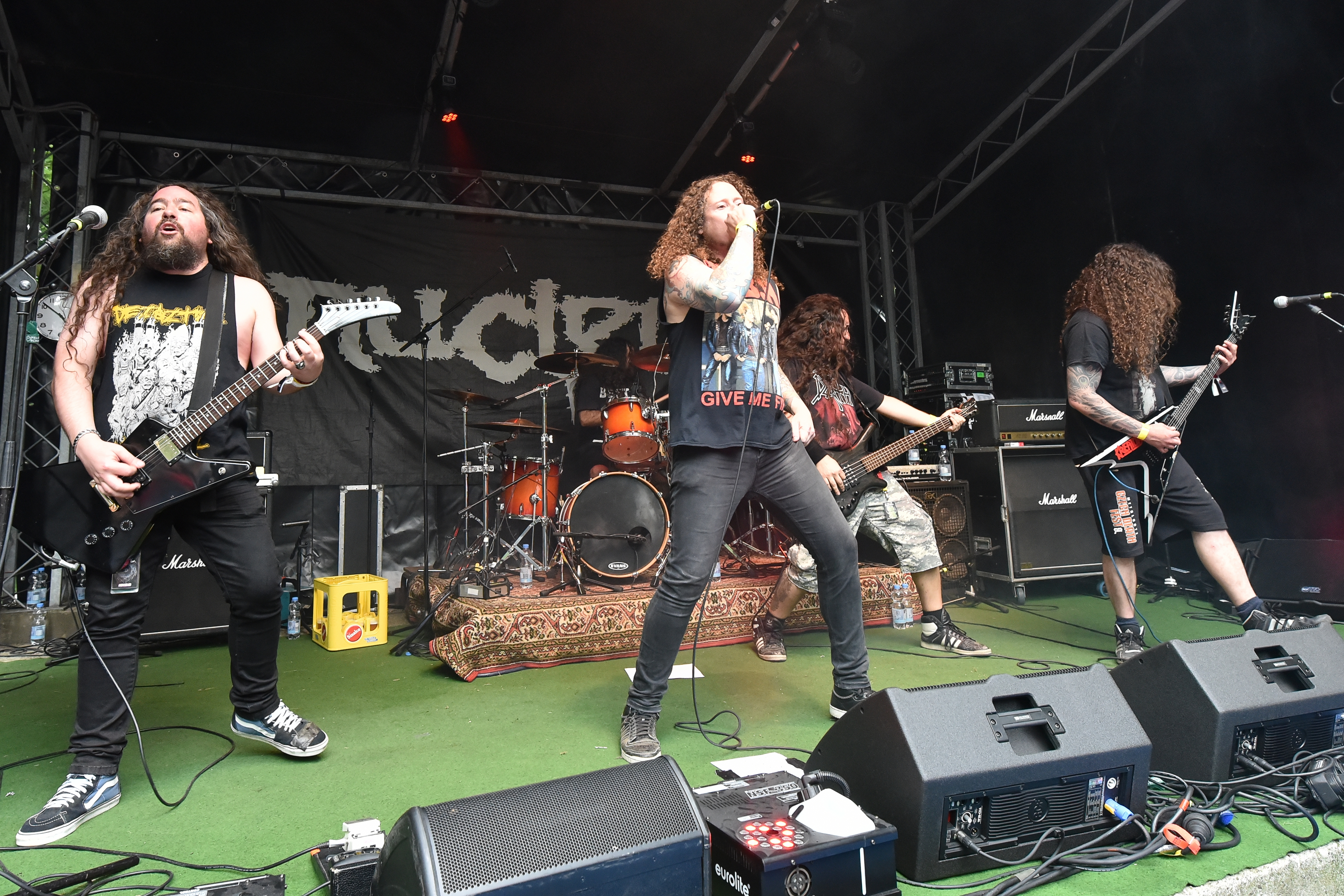 Nuclear bei Rage Against Racism 2017 in Duisburg